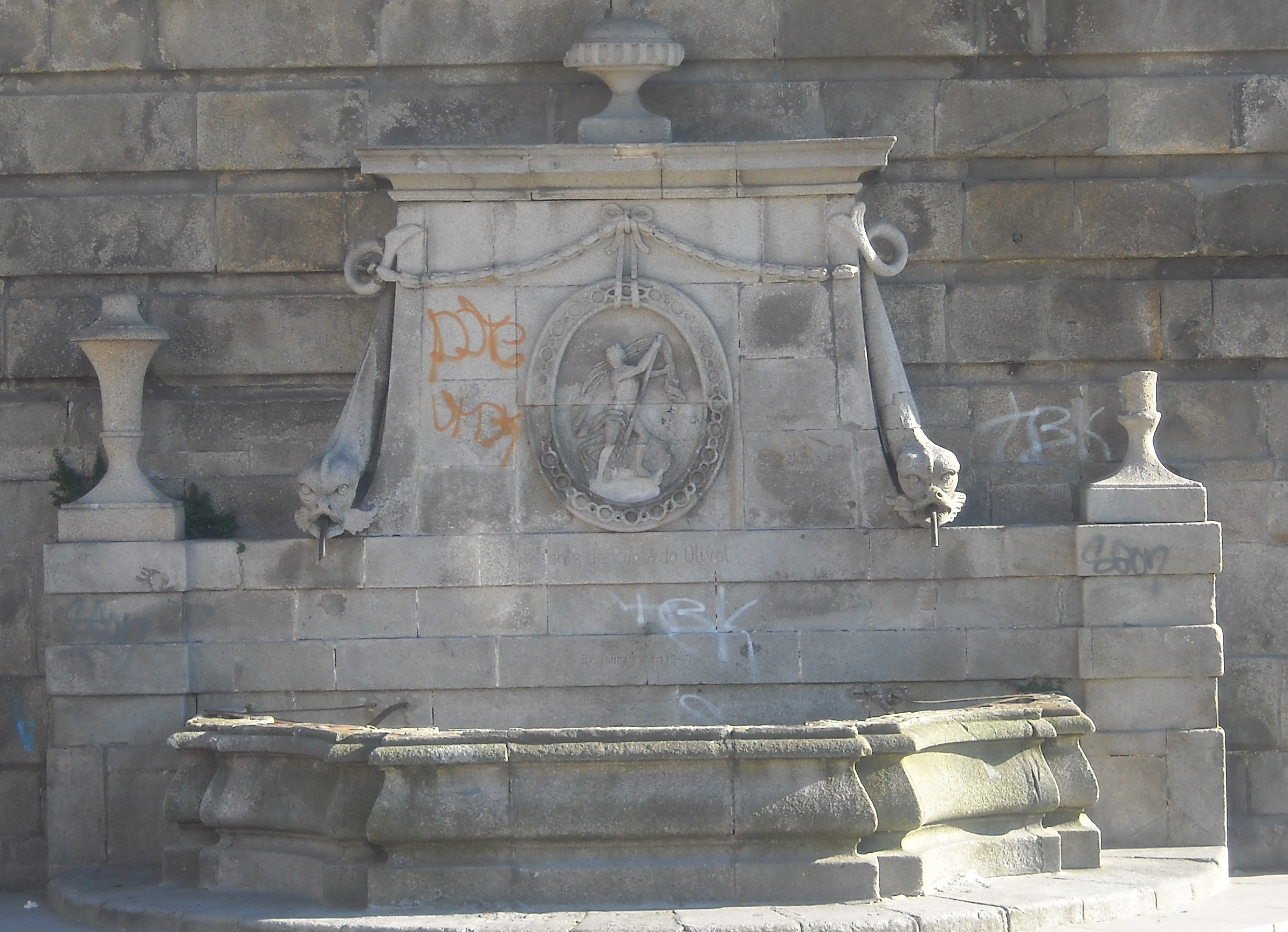 Fonte de Neptuno no Centro Português de Fotografia localizado na cidade do Porto, Portugal.